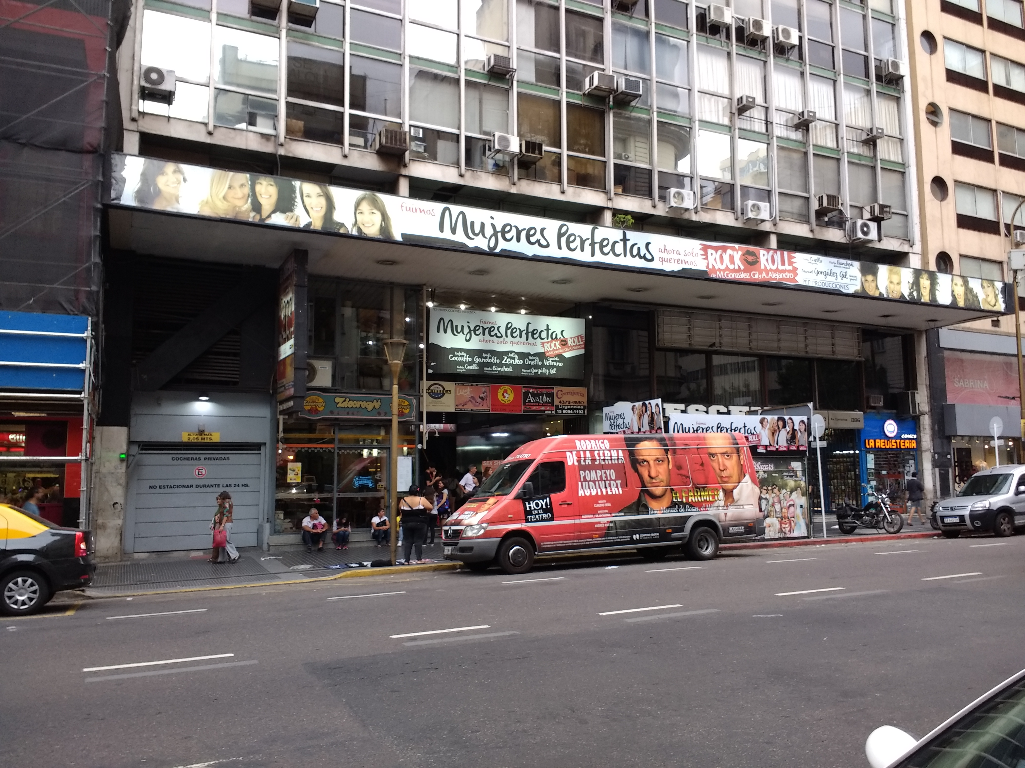 Teatro Apolo (Buenos Aires)